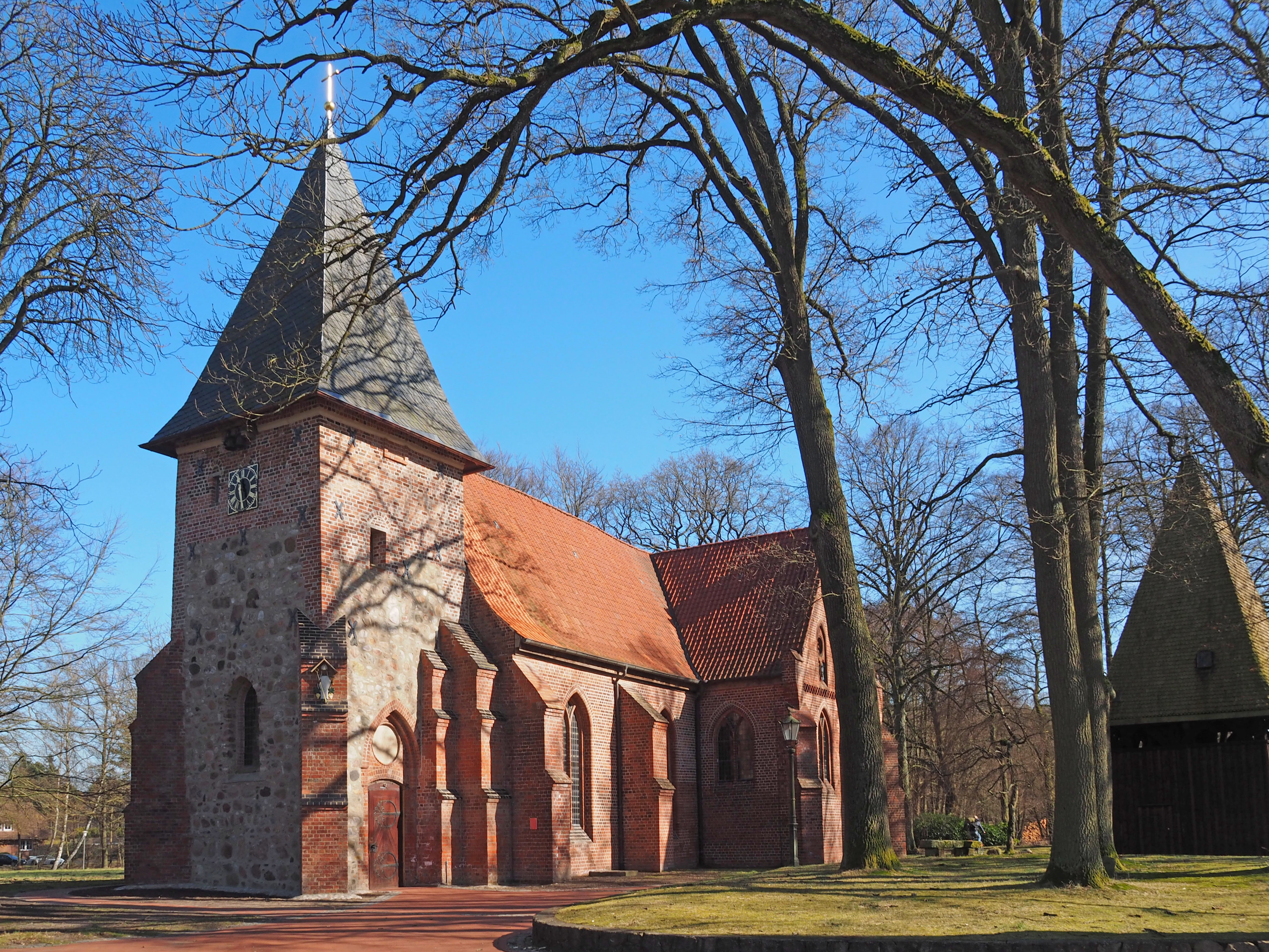 St. Urbani-Kirche in Munster (Örtze)